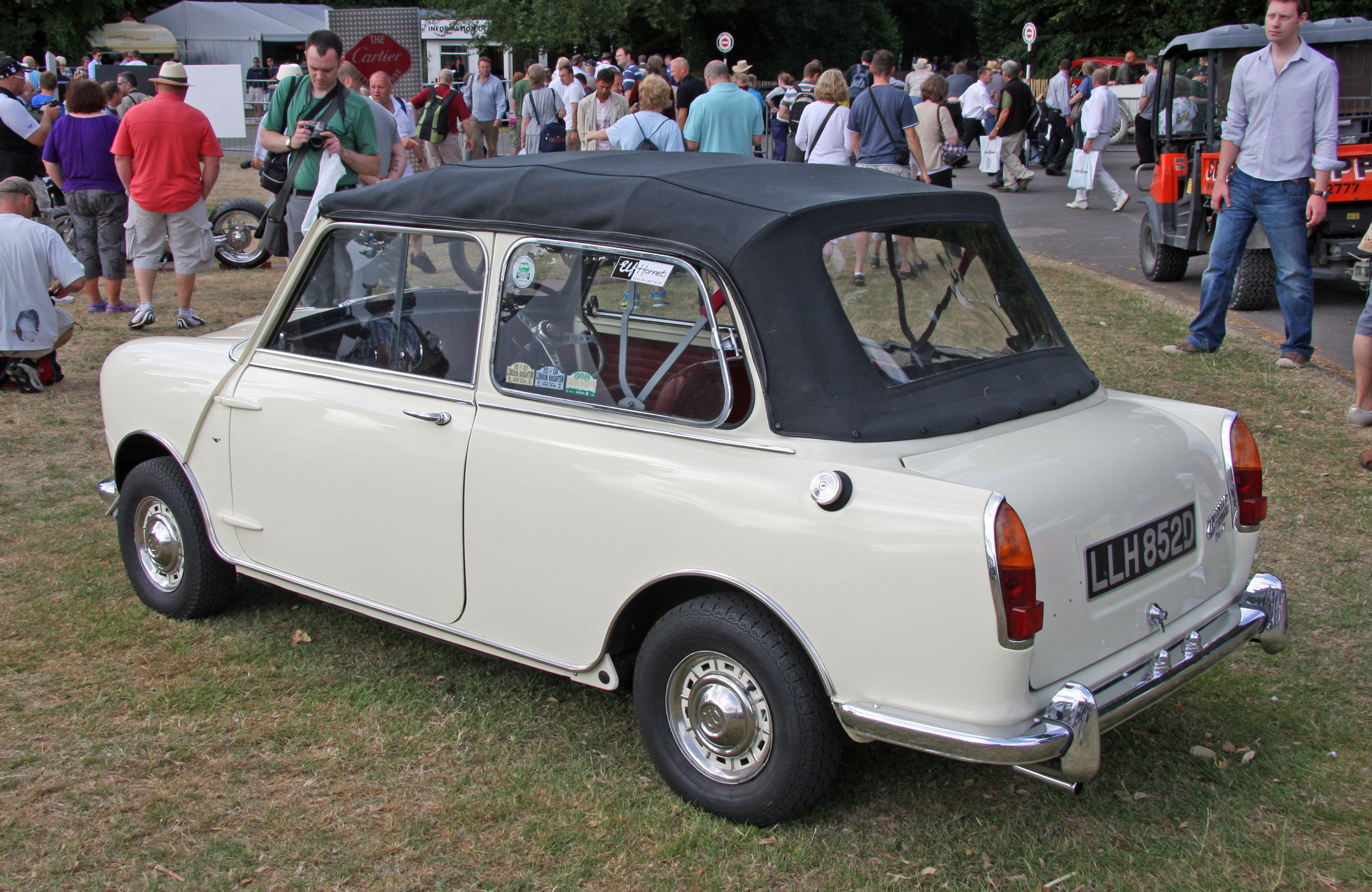 1966 Wolseley Hornet Convertible